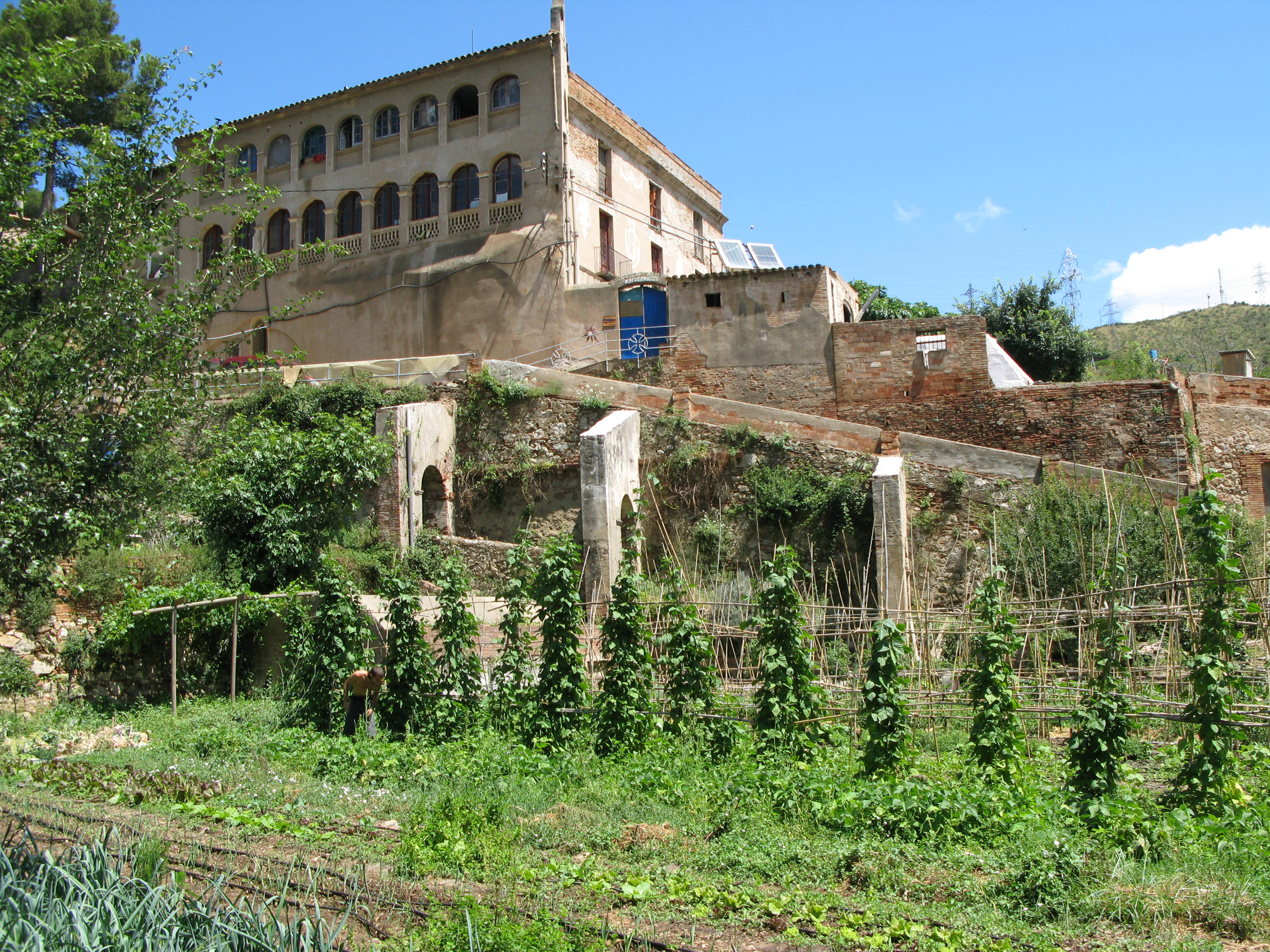 Can Masdeu visto desde los huertos.